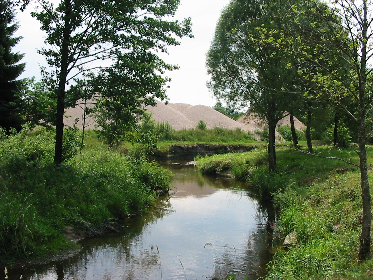 Le Neuné et la sablière à La Chapelle-devant-Bruyères.